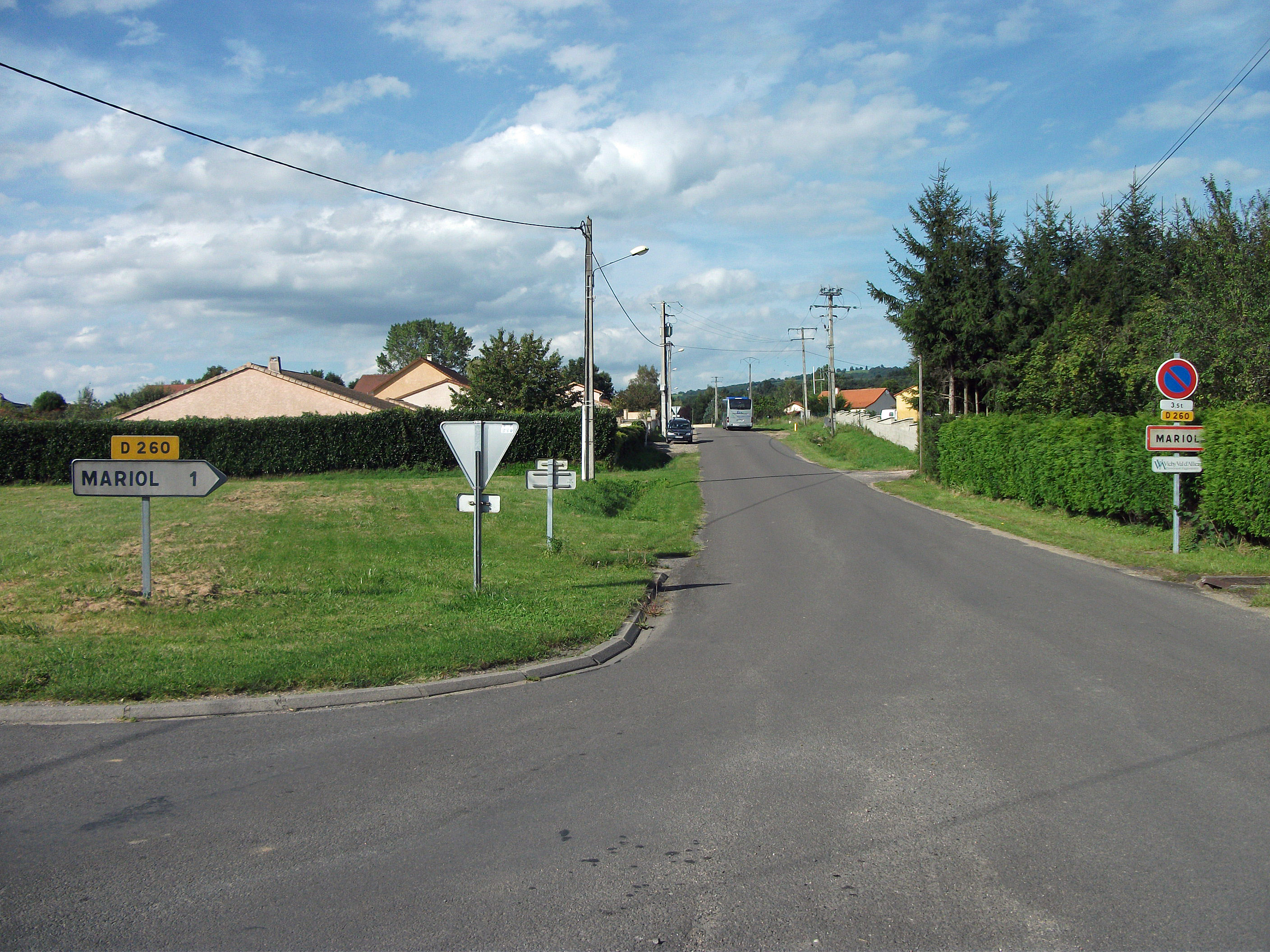 Entrée sud de Mariol par la D 260 et au loin un car TER Auvergne en service commercial assurant une liaison pour Vichy.